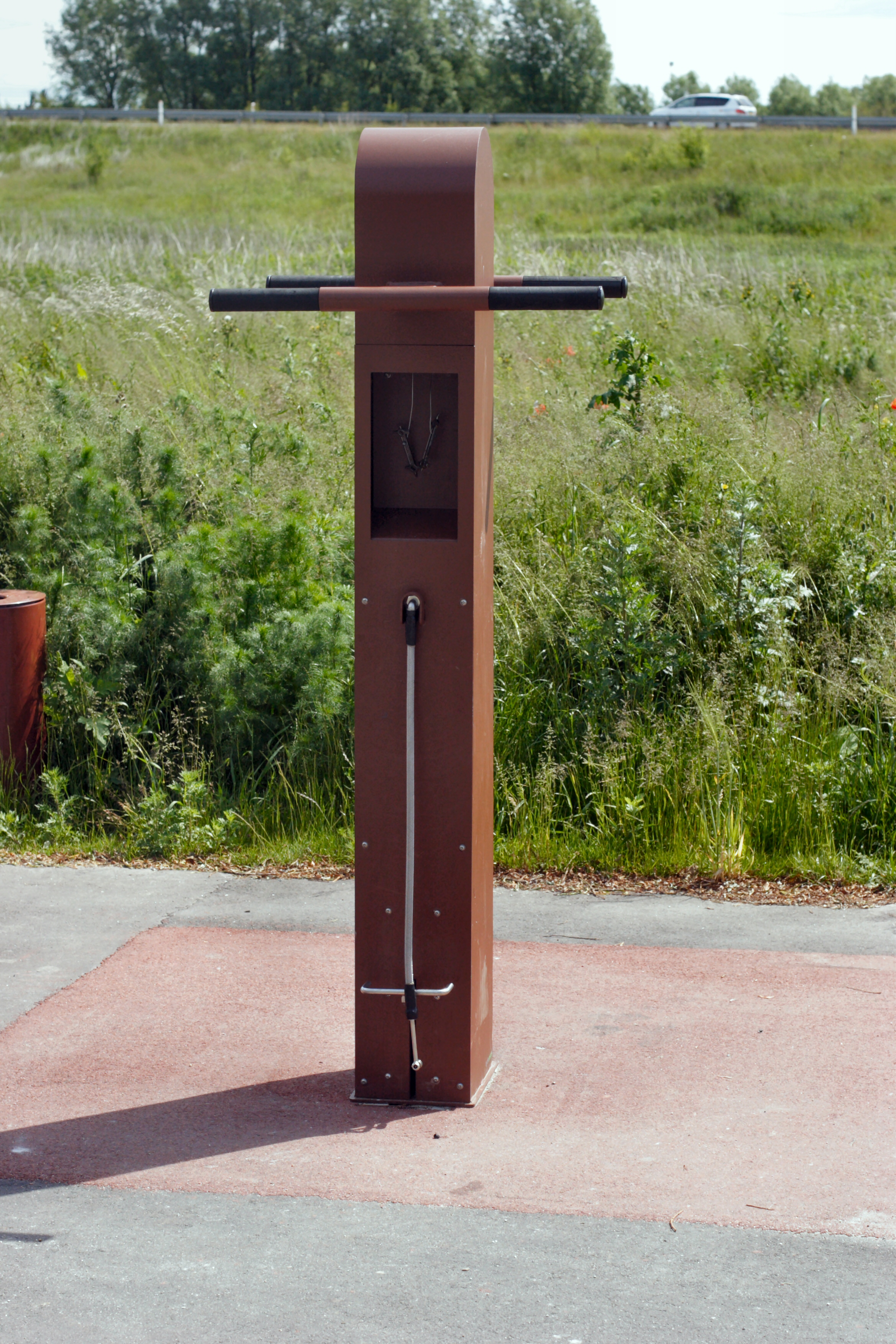 Parker og cykel terminal i Lystrup